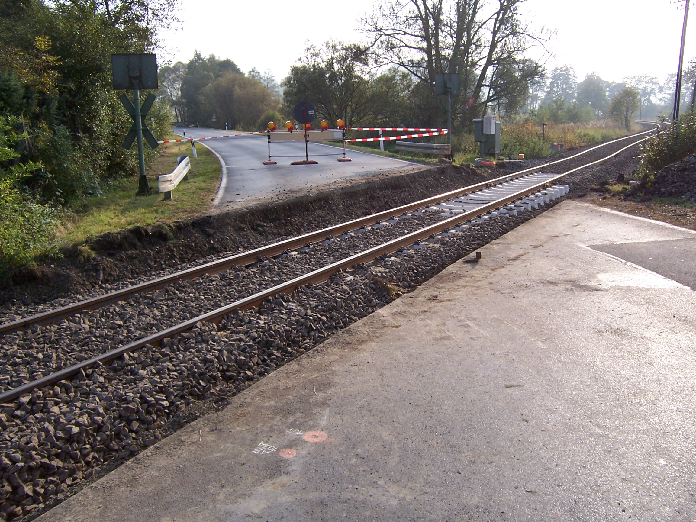 Erneuerung des Bahnübergang auf der Kreisstraße 110 von Carlshütte nach Allendorf